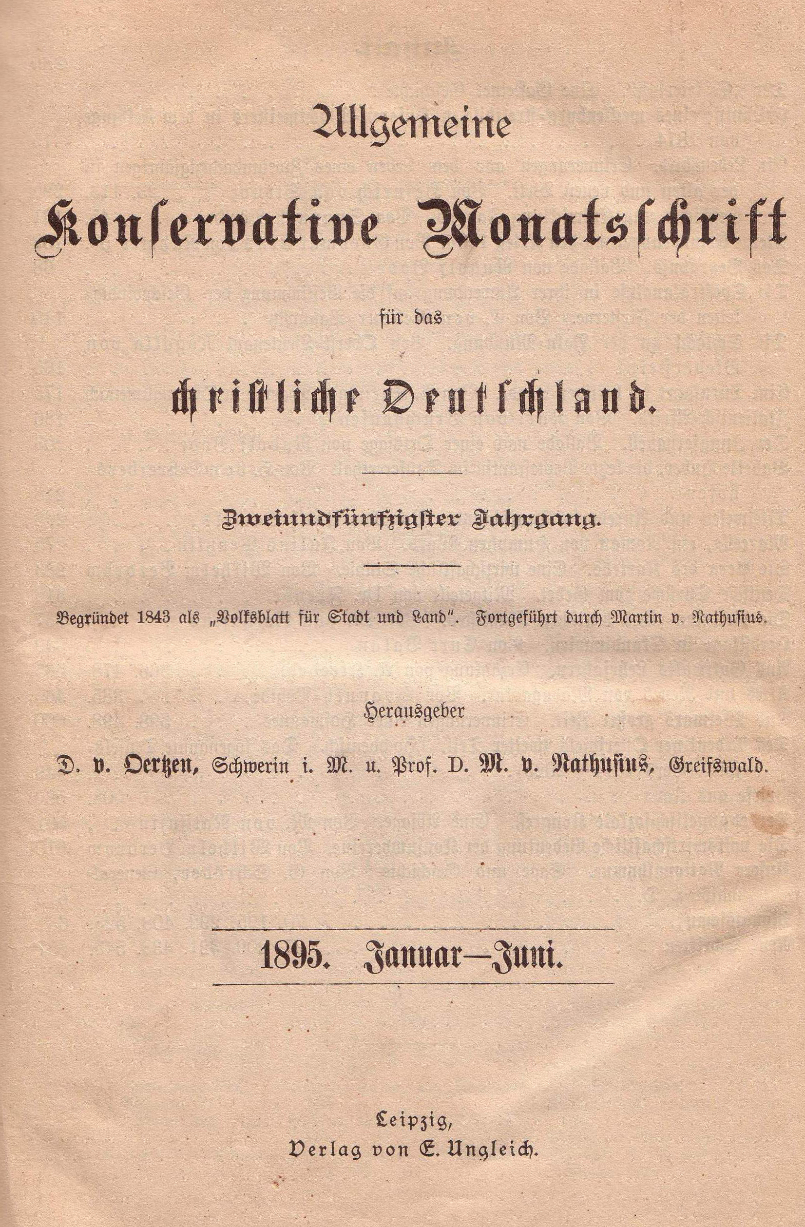 Martin von Nathusius, konservative Monatsschrift, magazine